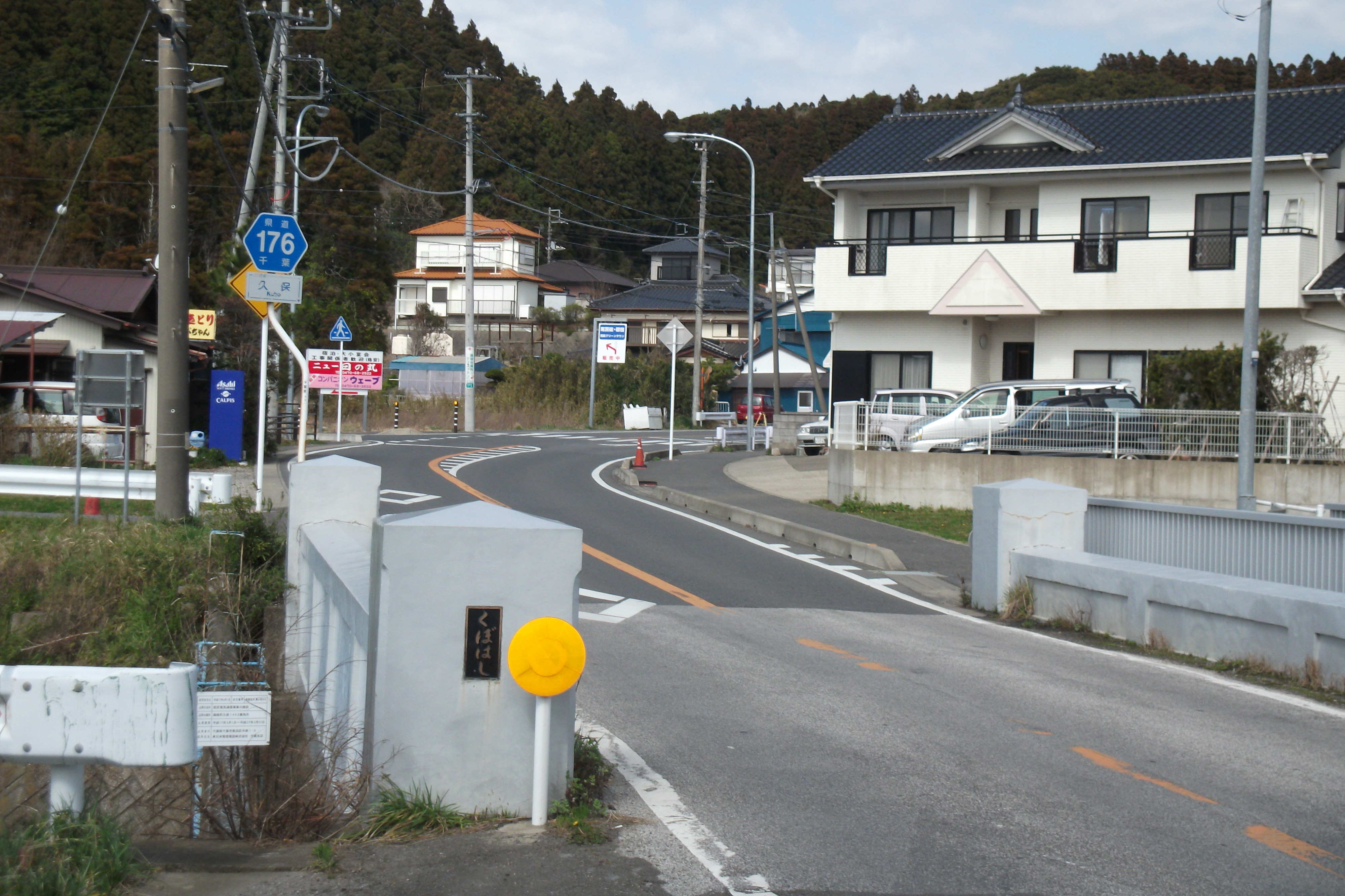 千葉県道176号夷隅御宿線 千葉県御宿町